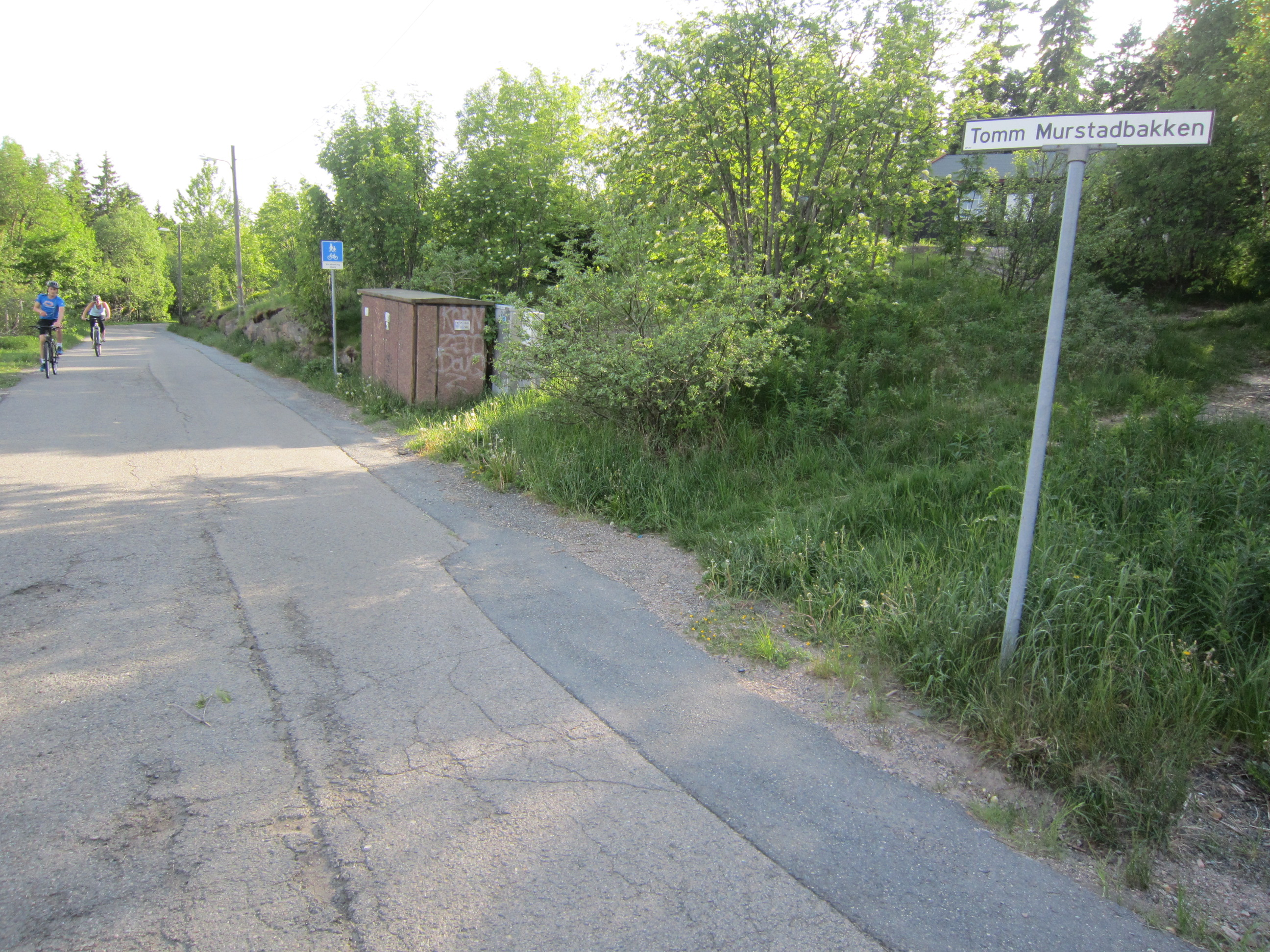 Tomm Murstadbakken (eller Tomm Murstad-bakken) i Oslo